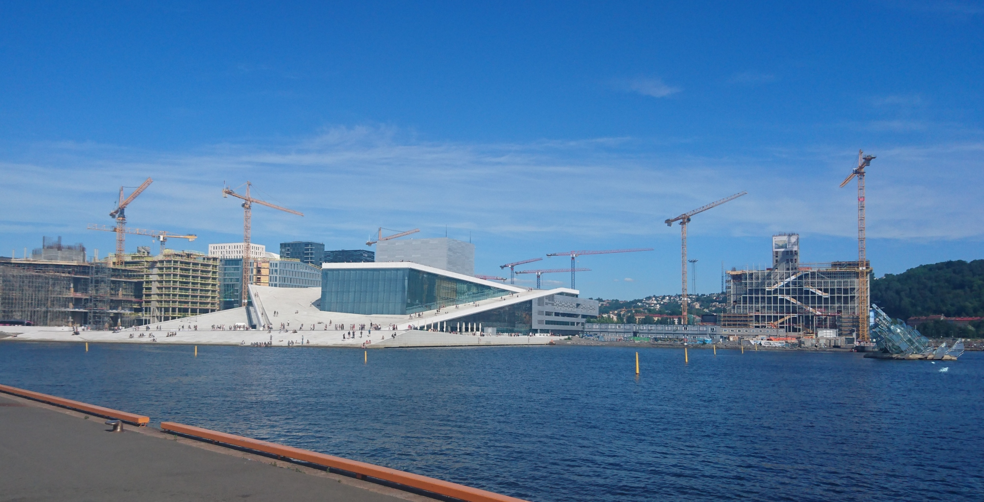 Oslo, Hafen